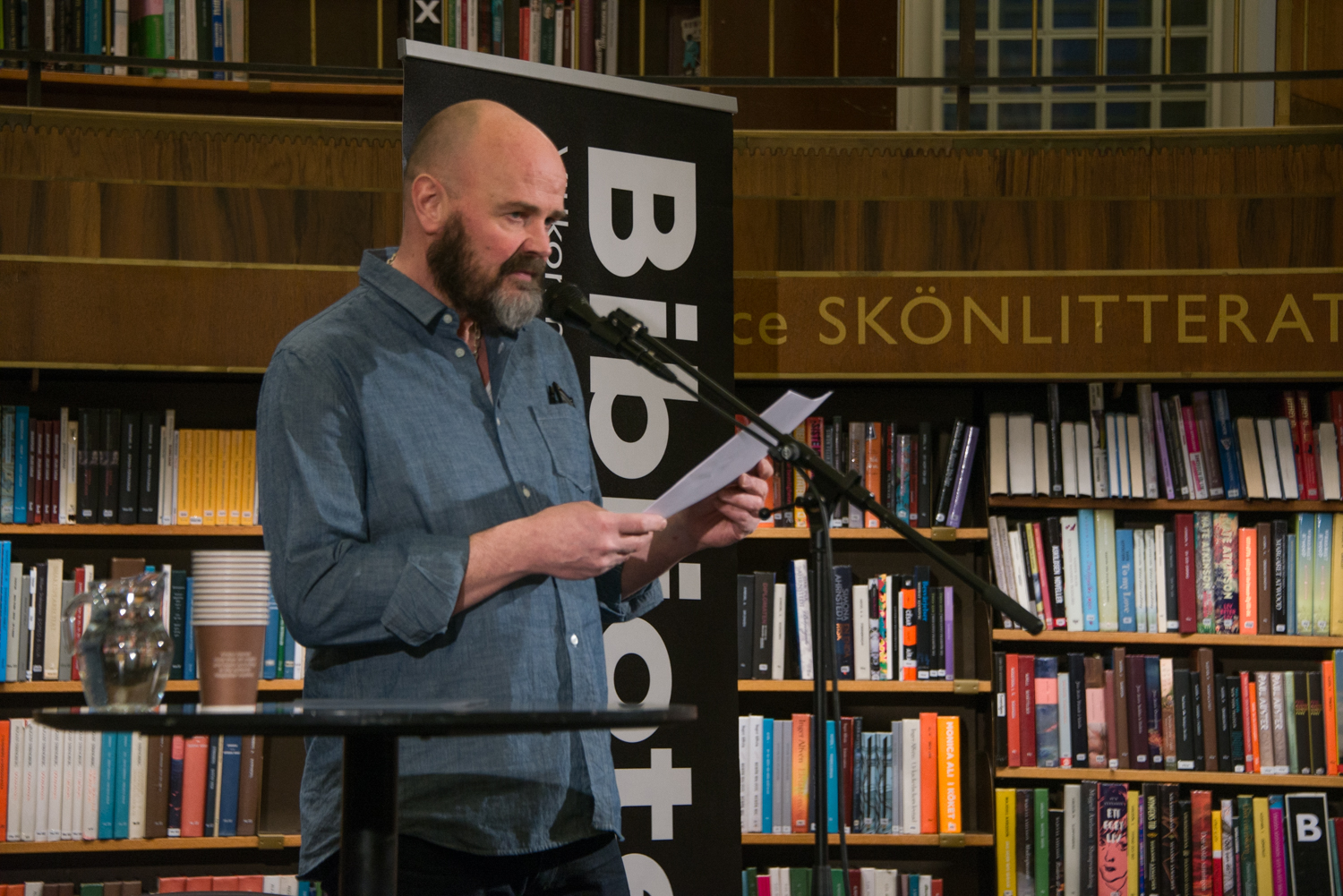 Lars Hermansson på Poesimässan på Stockholms Stadsbibliotek den 23 mars 2018.